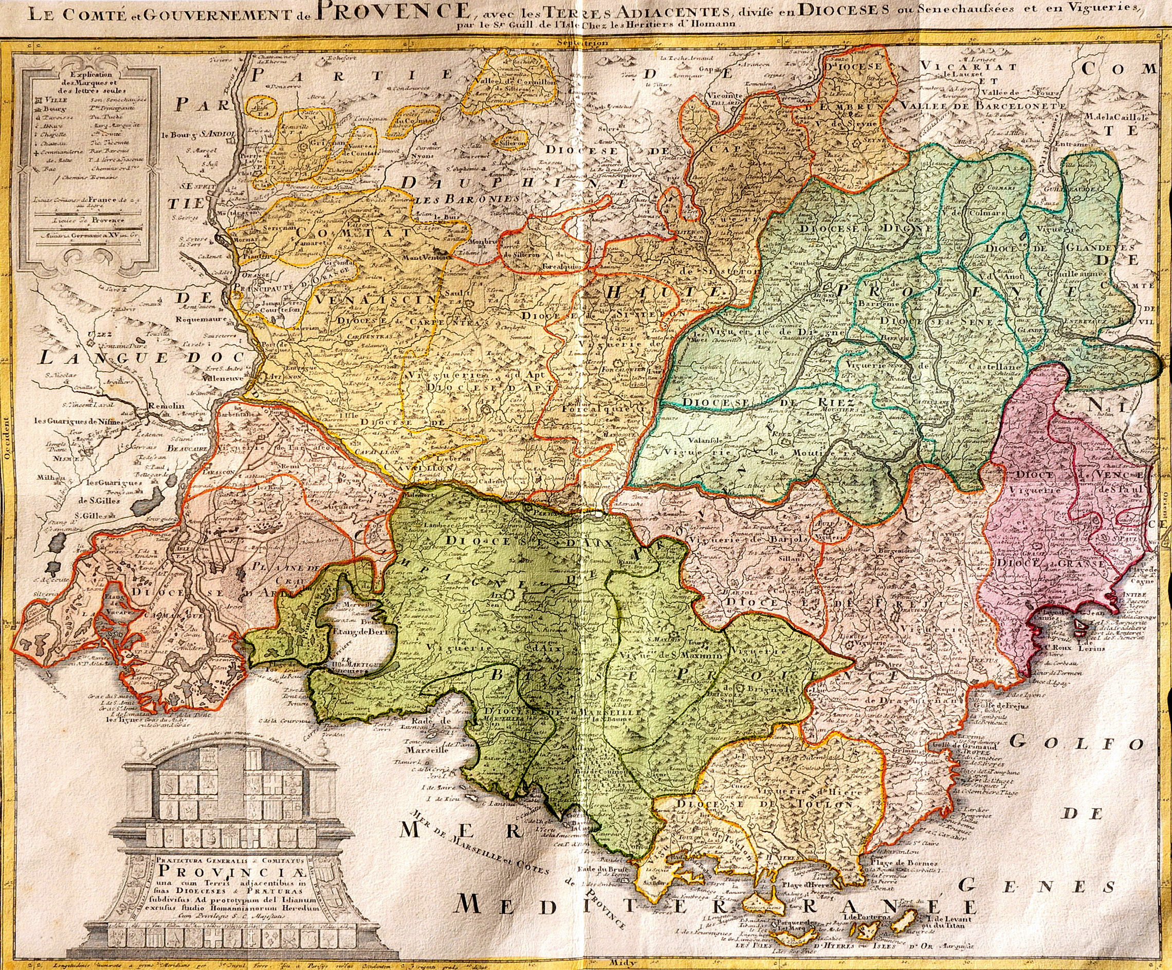 carte de la Provence, par Guillaume de l'Isle, publée par Hoffman en 175